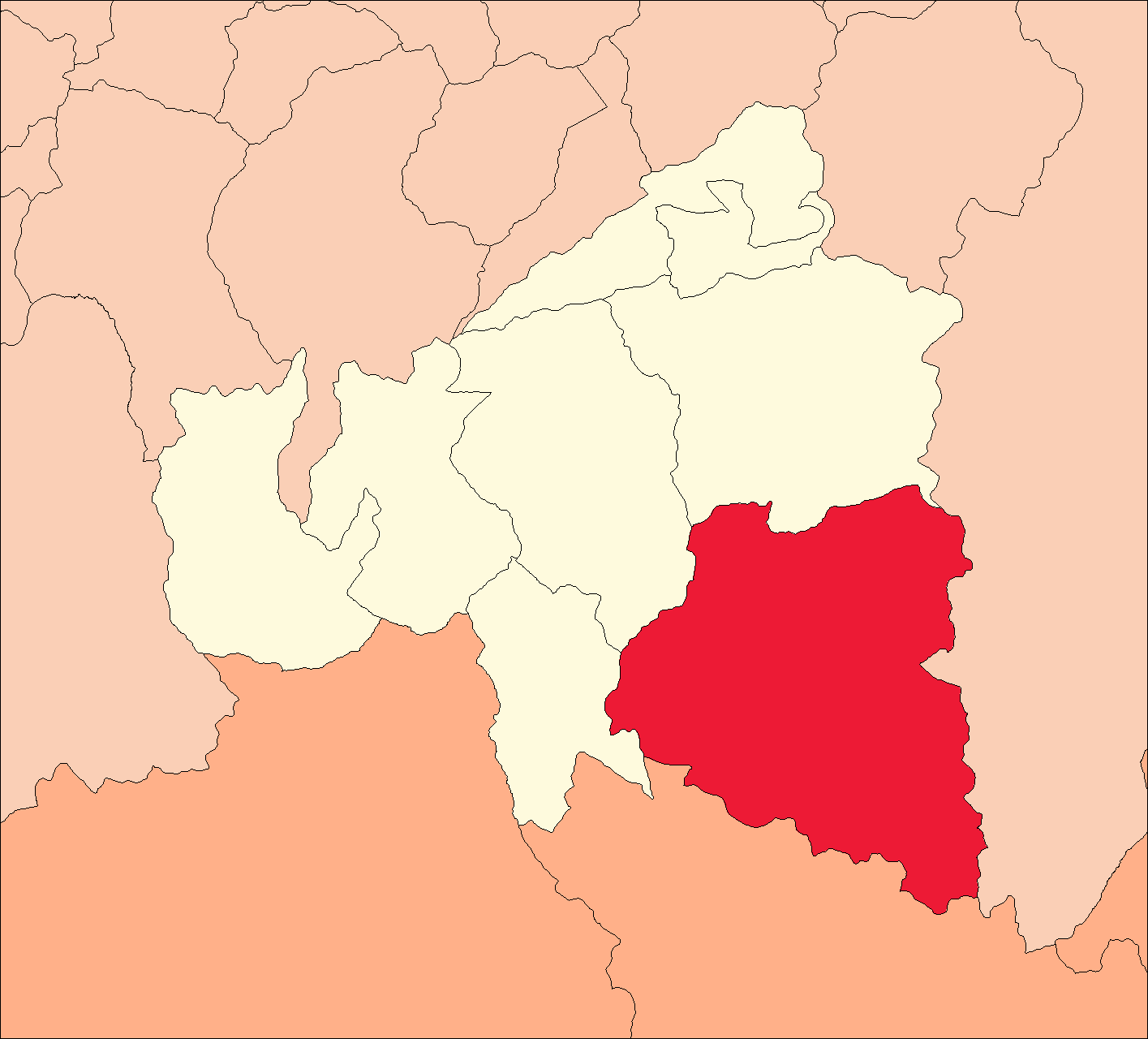 Área del distrito de San Rafael.